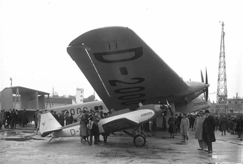 Das größte deutsche Landflugzeug der Welt Junkers "G 38" landete auf dem Centralflughafen in Berlin-Tempfelhof! Die Riesen-Junkers "G 38" nach der Landung auf dem Centralflughafen wird von dem Publikum besichtigt.